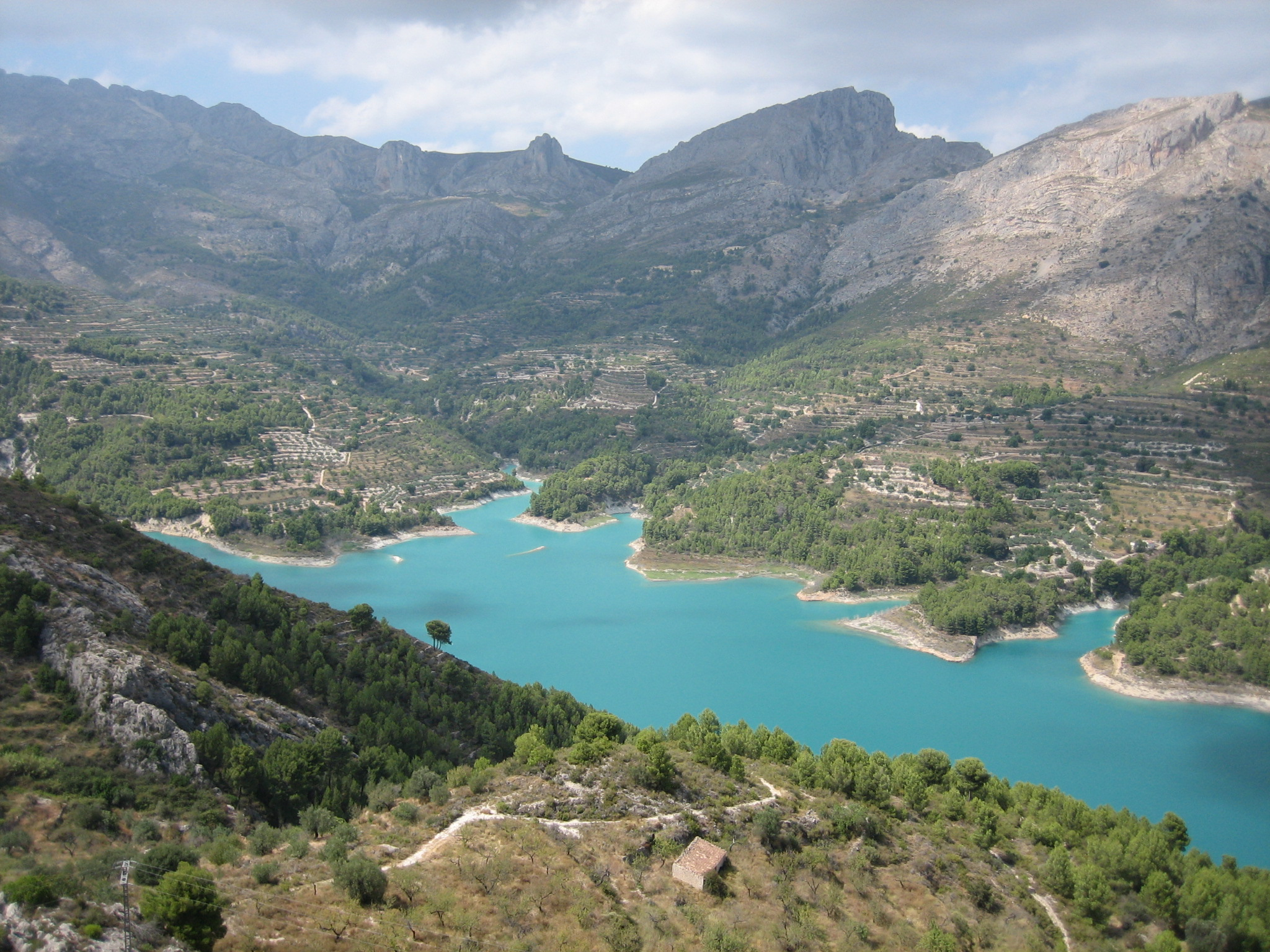 Vista del Embalse de Guadalest, que recoge las aguas del río homónimo, en el valle de Guadalest (provincia de Alicante, España). Fotografía realizada desde la localidad de Guadalest. Fecha: 06/08/2006 Autor: Rodriguillo